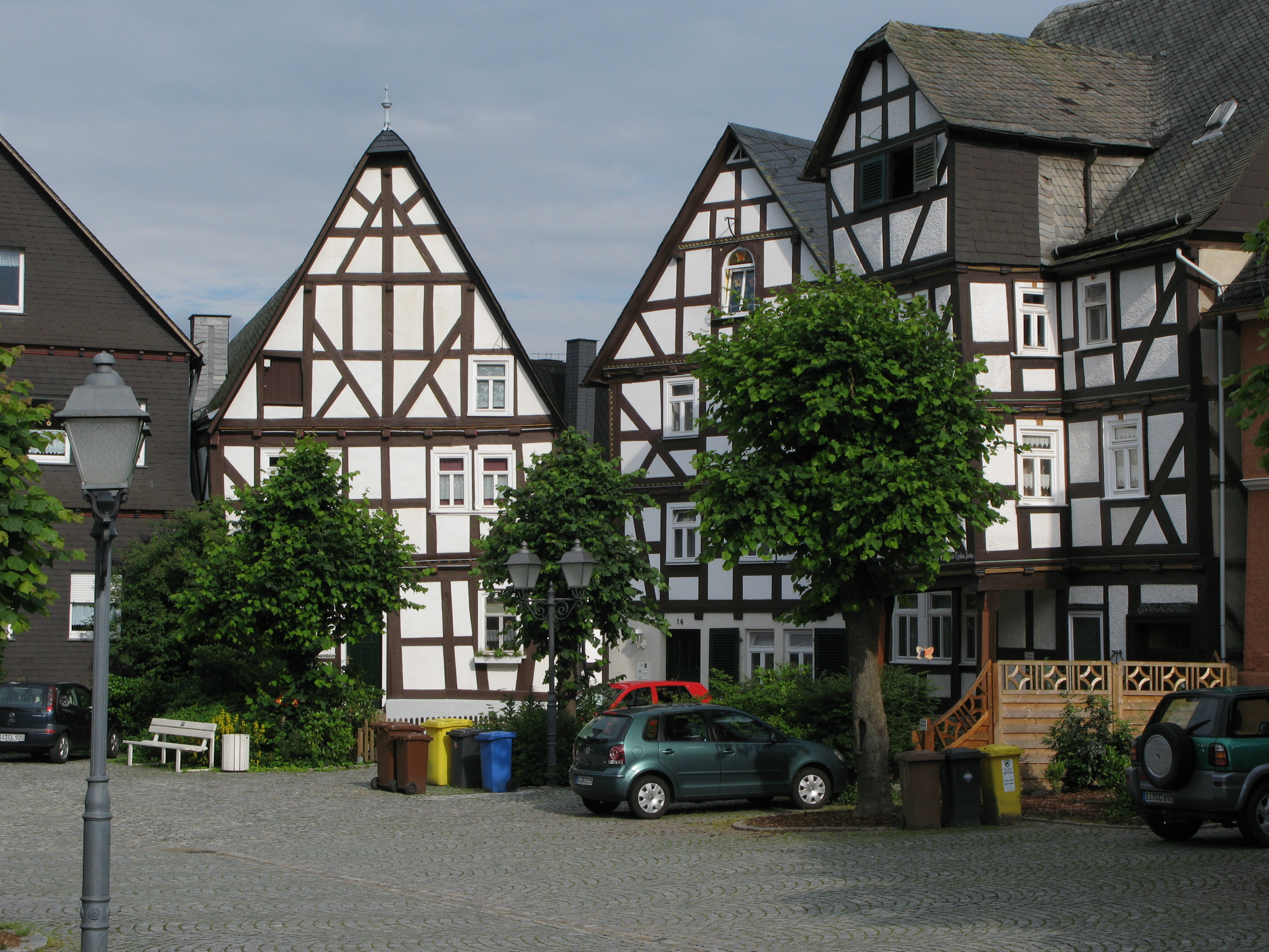 Fachwerkhäuser von etwa 1685 am Kirchplatz in Bad Laasphe (Nr. 12 - 18, von rechts), Foto 2007